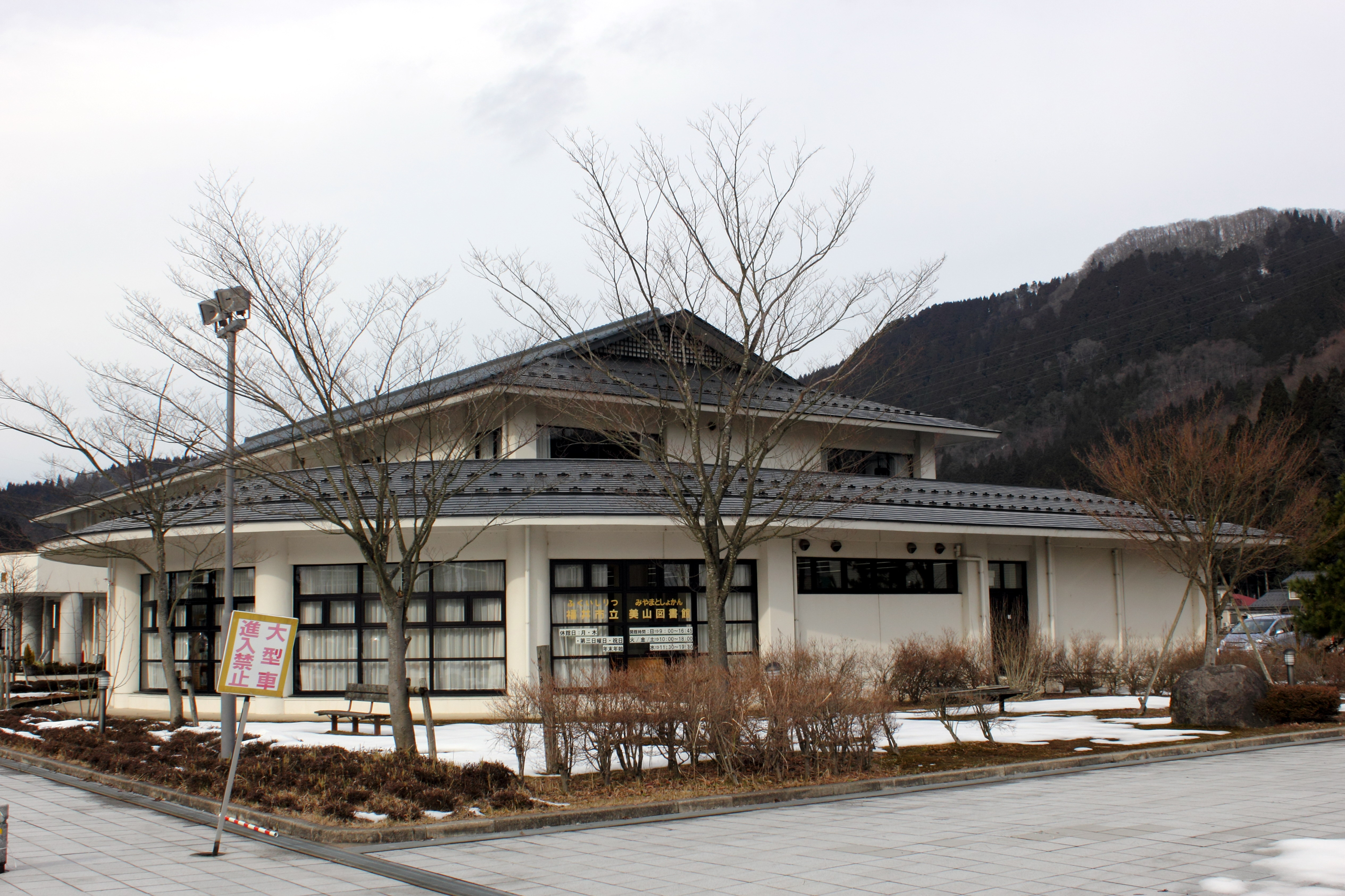 福井市立美山図書館